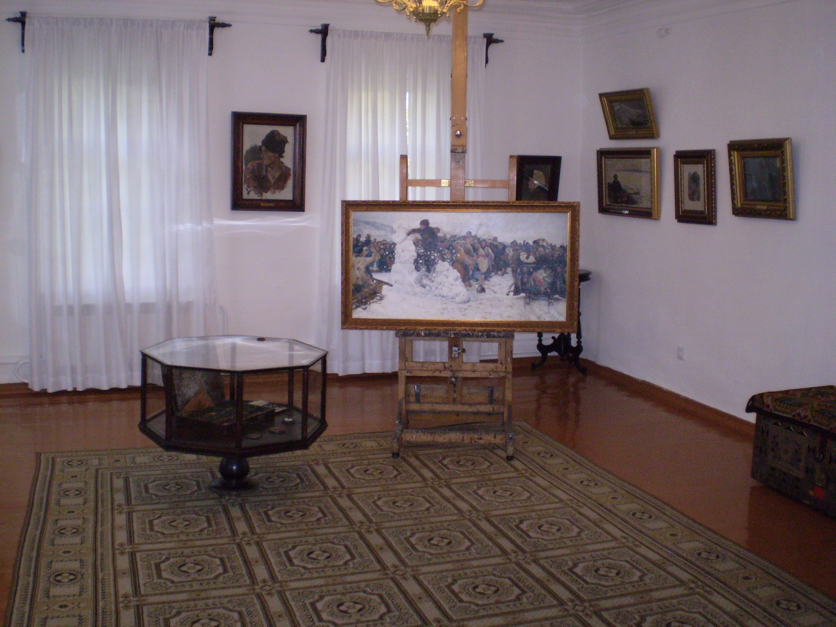 Усадьба Суриковых в Красноярске. Мастерская.